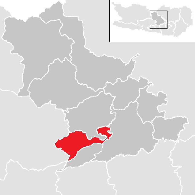 Bezirk Feldkirchen